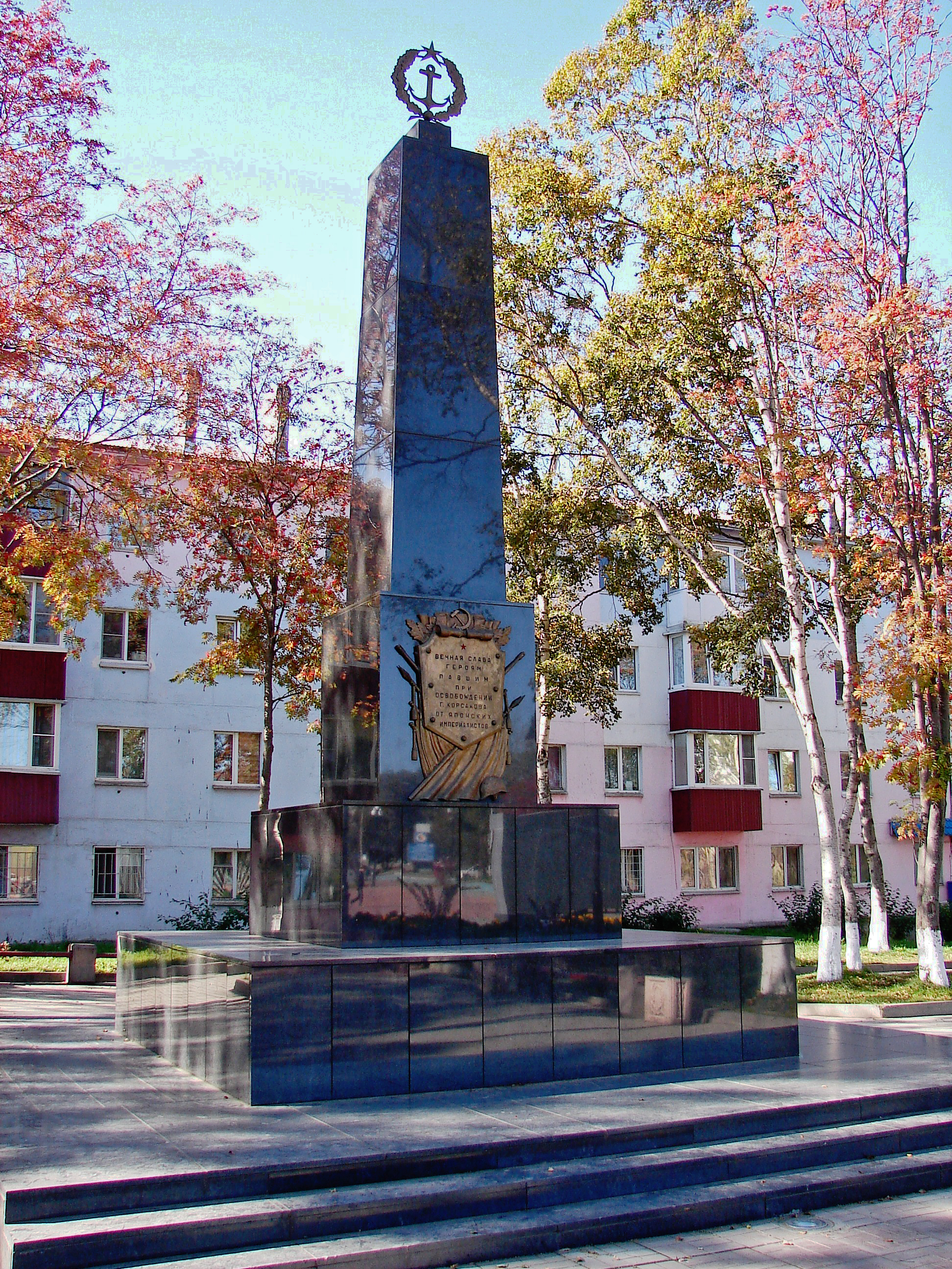 Обелиск советским военным морякам, погибшим в августе 1945 г. в боях за освобождение г. Корсакова от японских империалистов: улица Советская, Корсаков, Корсаковский район, Сахалинская область